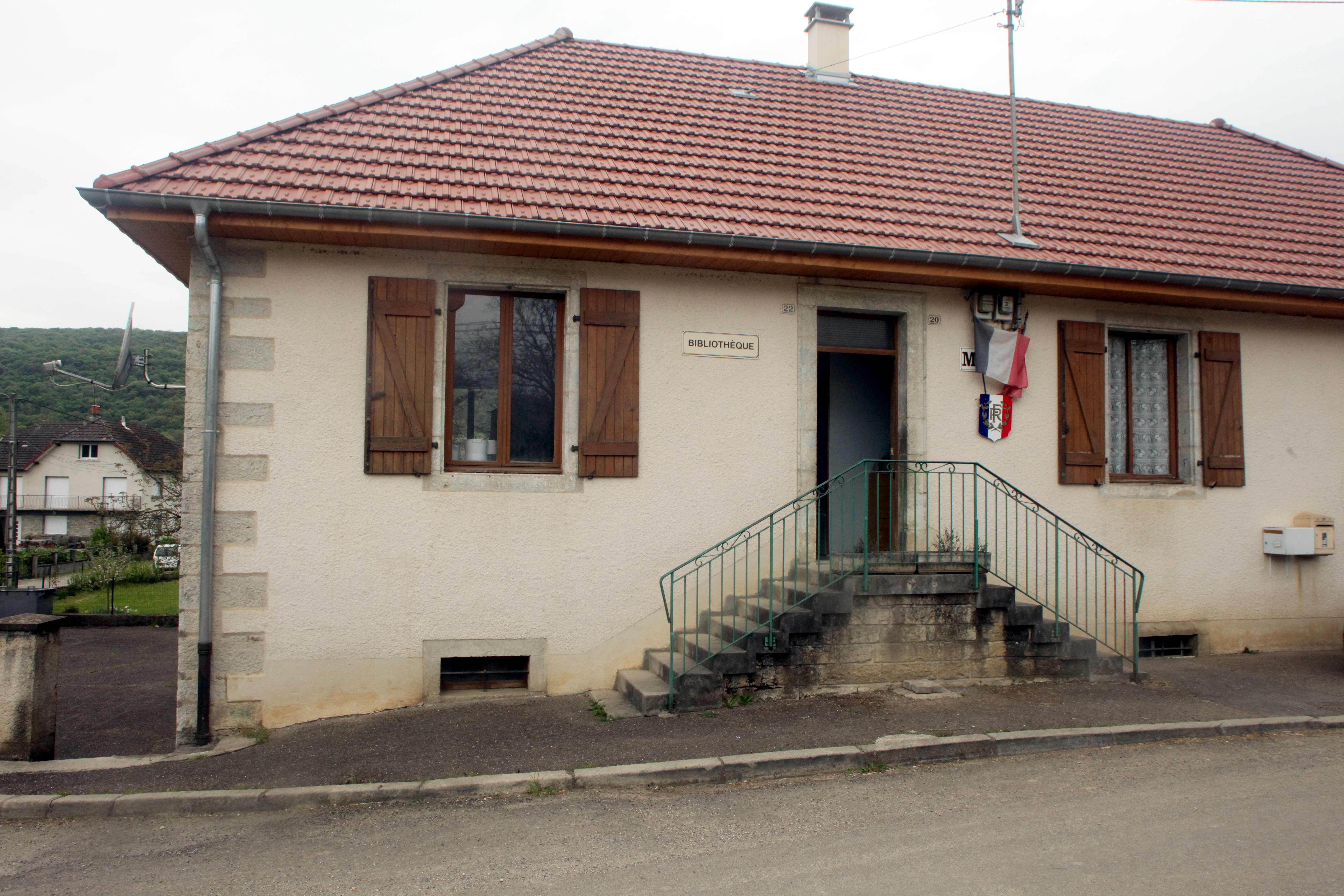 Mairie de Chay (Doubs).